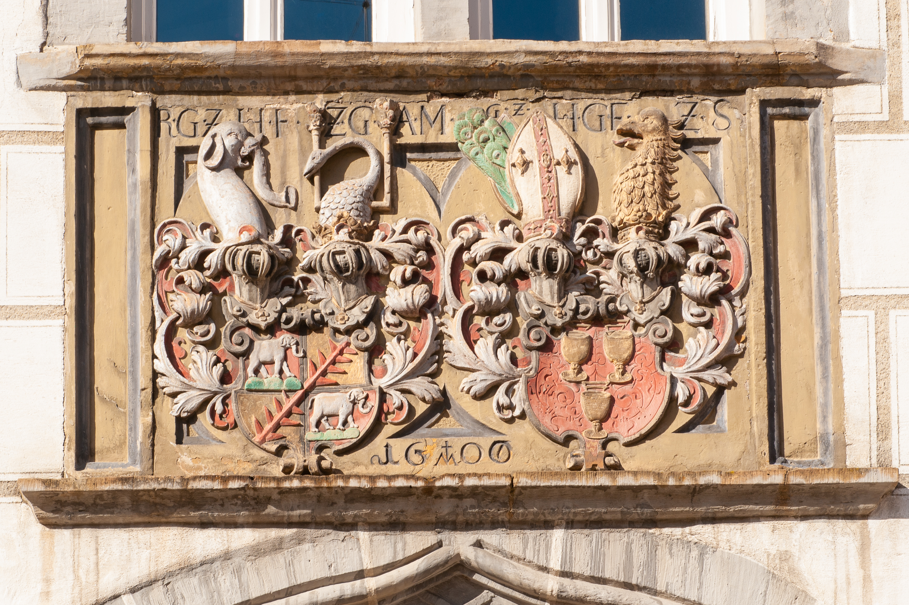 "Allianzwappen" des Grafen Rudolf VI. und seiner Gattin Anna Maria von Staufen von 1600 am Helfensteiner Schloss, Wiesensteig, Kreis Göppingen